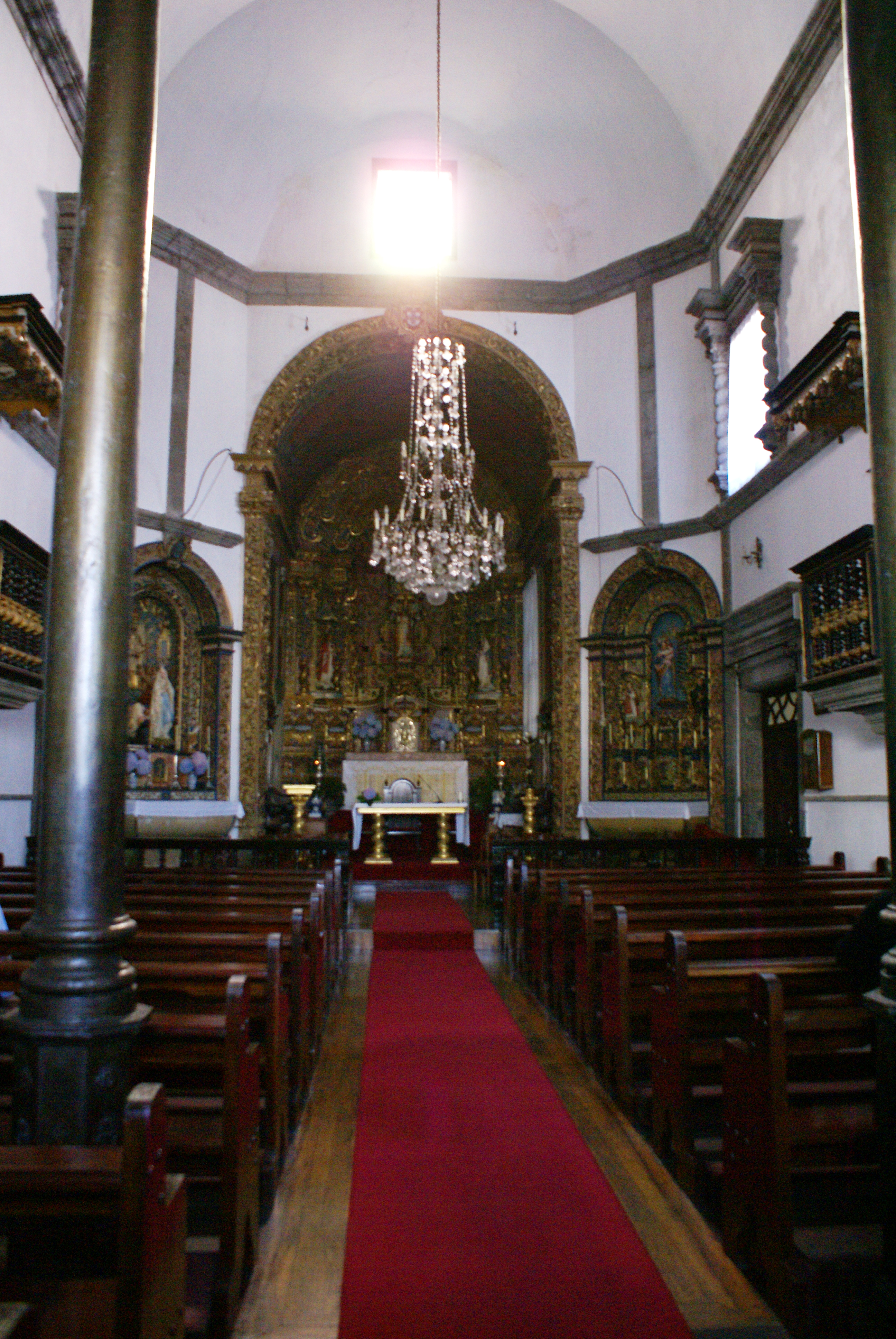 Nave of the Church of São Pedro, São Pedro, Vila Franca do Campo, São Miguel (Azores), Portugal